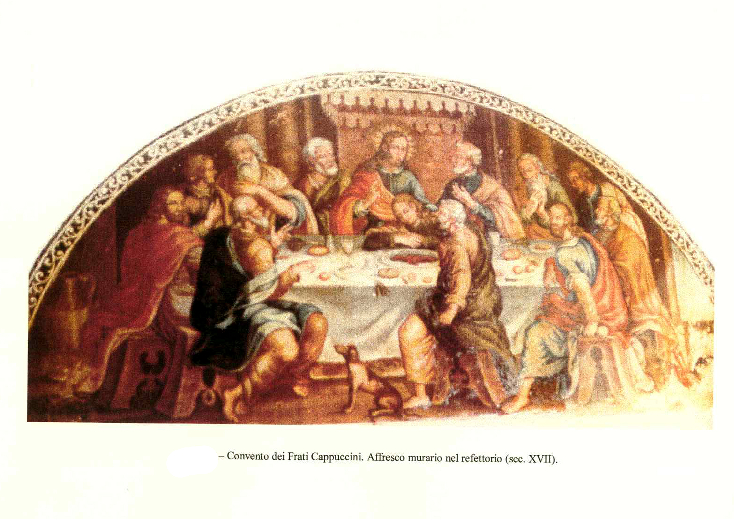 Affresco